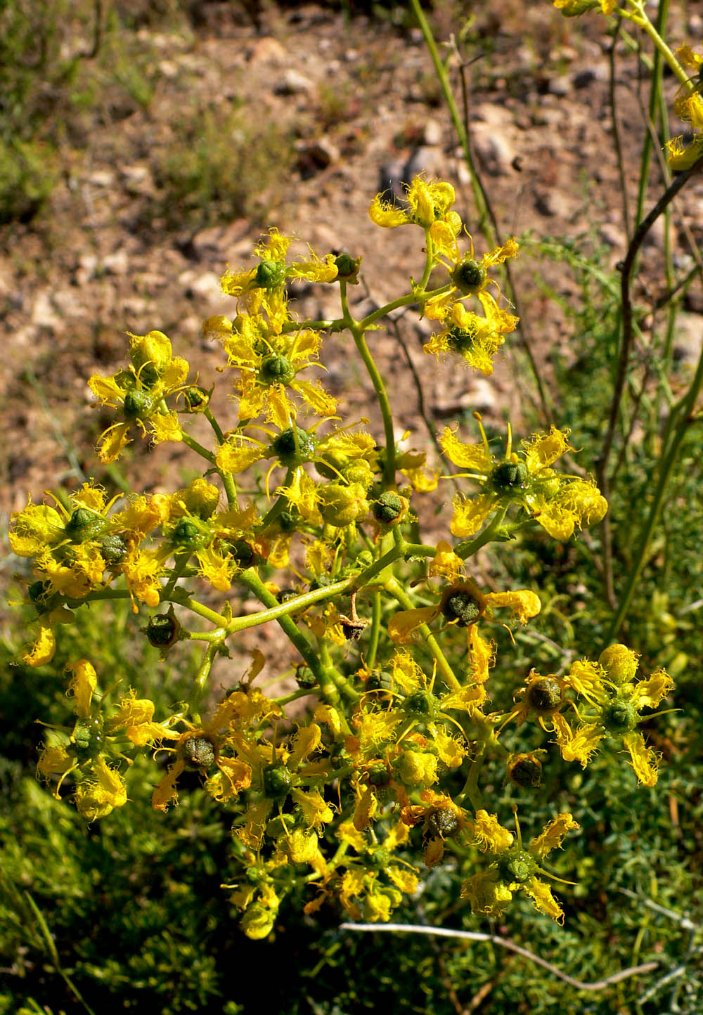 Ruta angustifolia en el Parque natural de la Sierra de la Muela. Cartagena (Spain)